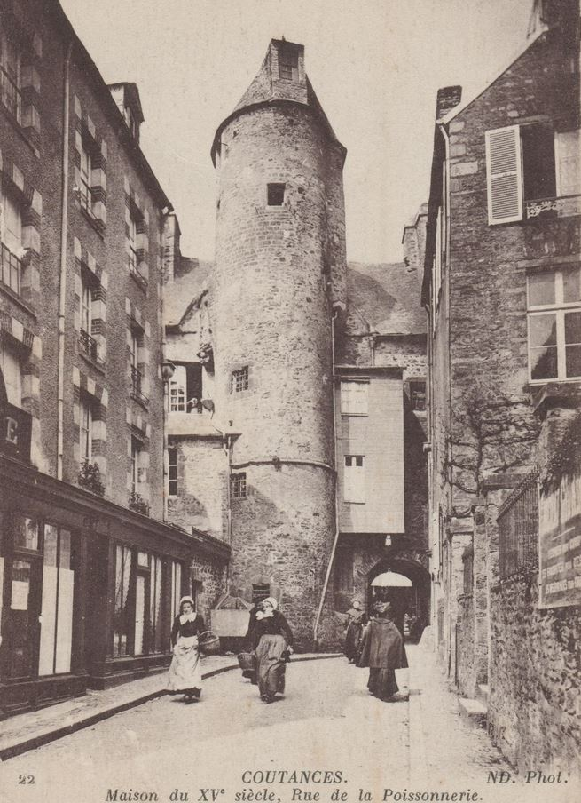 carte postale du début du XXe siècle avec en illustration photo une maison du XVe siècle, rue de la Poissonnerie, à Coutances.